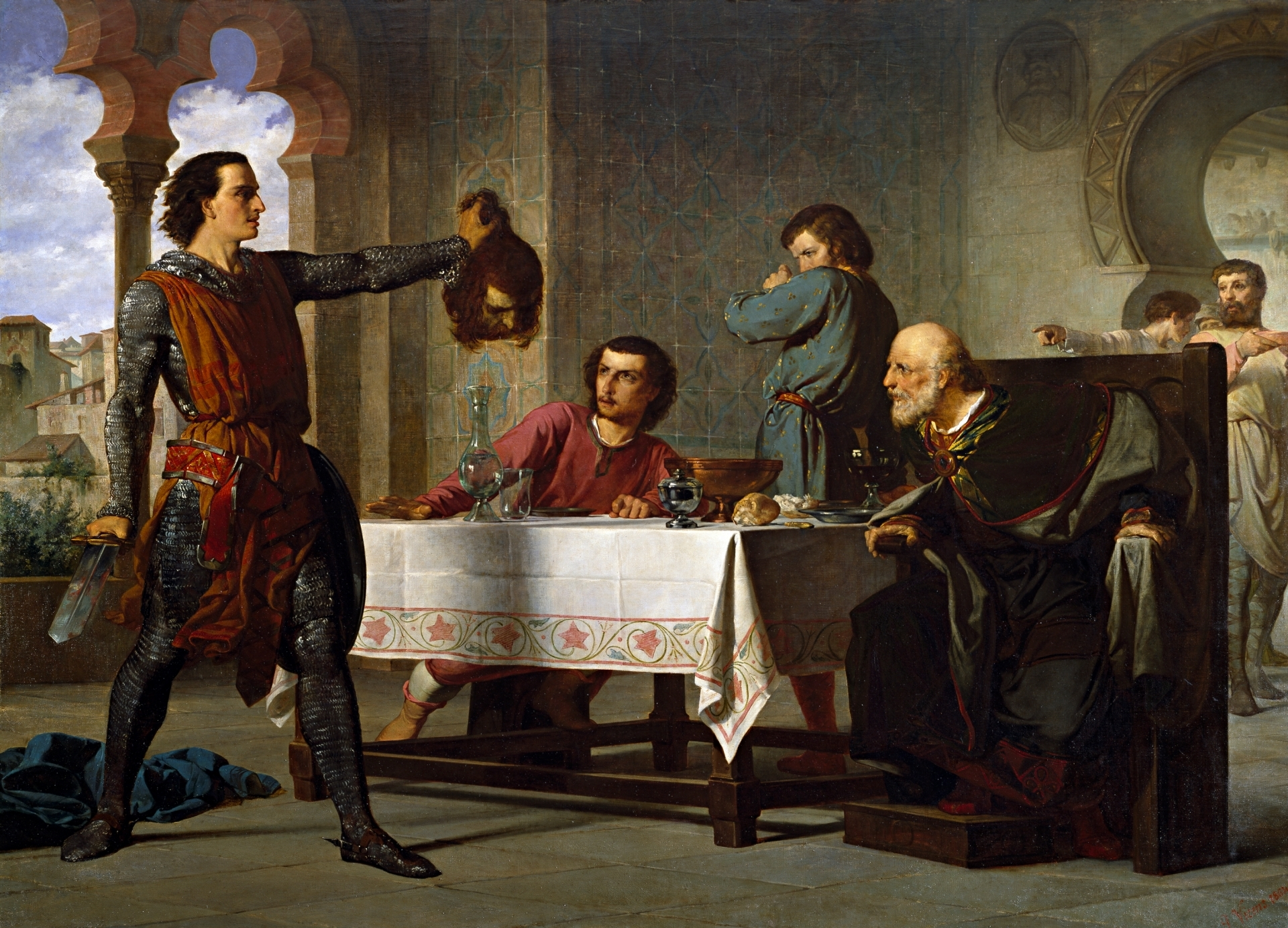 La obra representa al Cid Campeador mostrando a su padre, Diego Laínez, la cabeza de su enemigo, el conde Lozano.